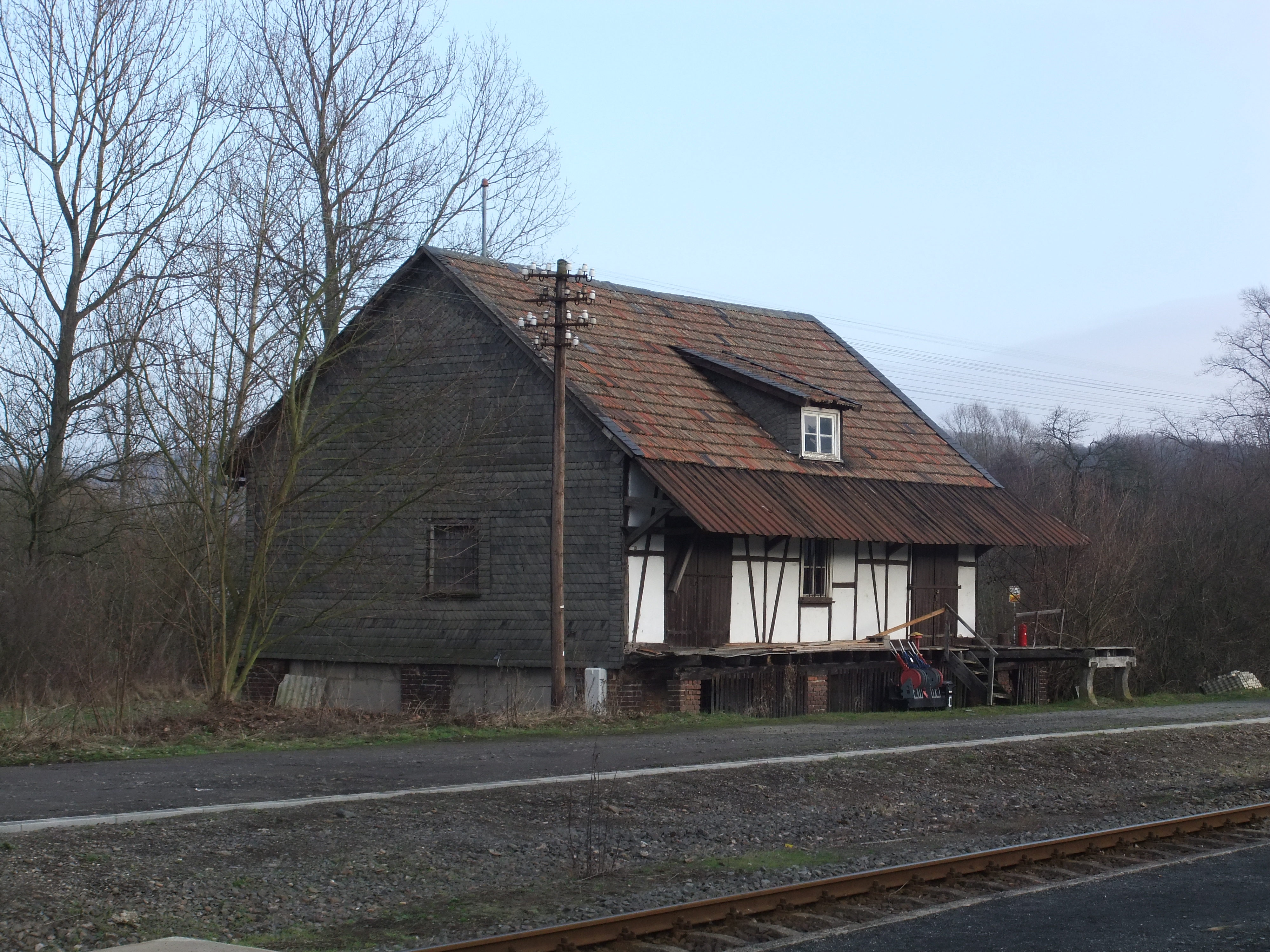 Bahnhof Friedensdorf (Lahn) - ehemaliger Raiffeisen-Güterschuppen